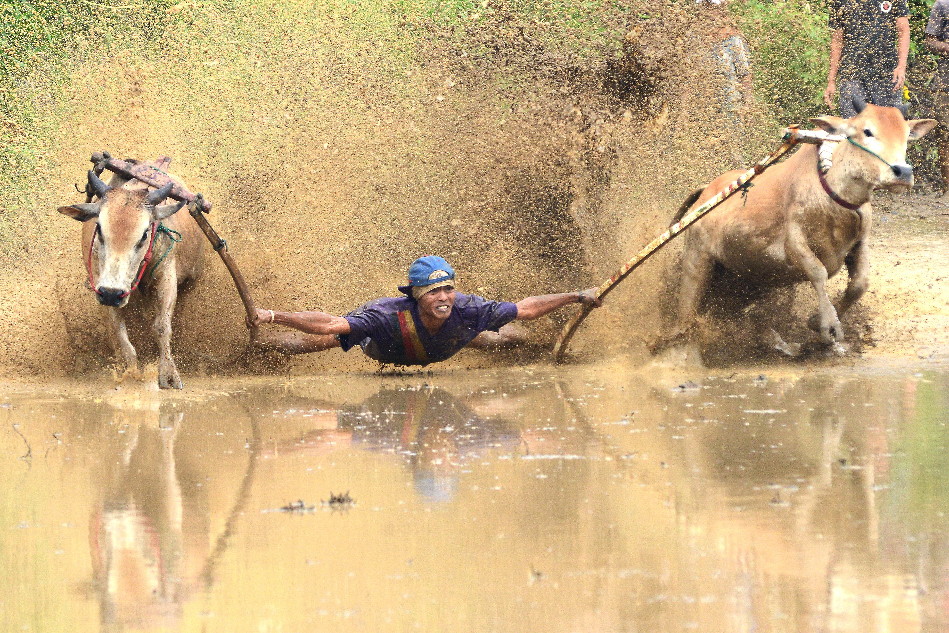 Tradisi sehabis panen di Tanah datar, yang kini menjadi atraksi rutin tontonan untuk wisatawan.